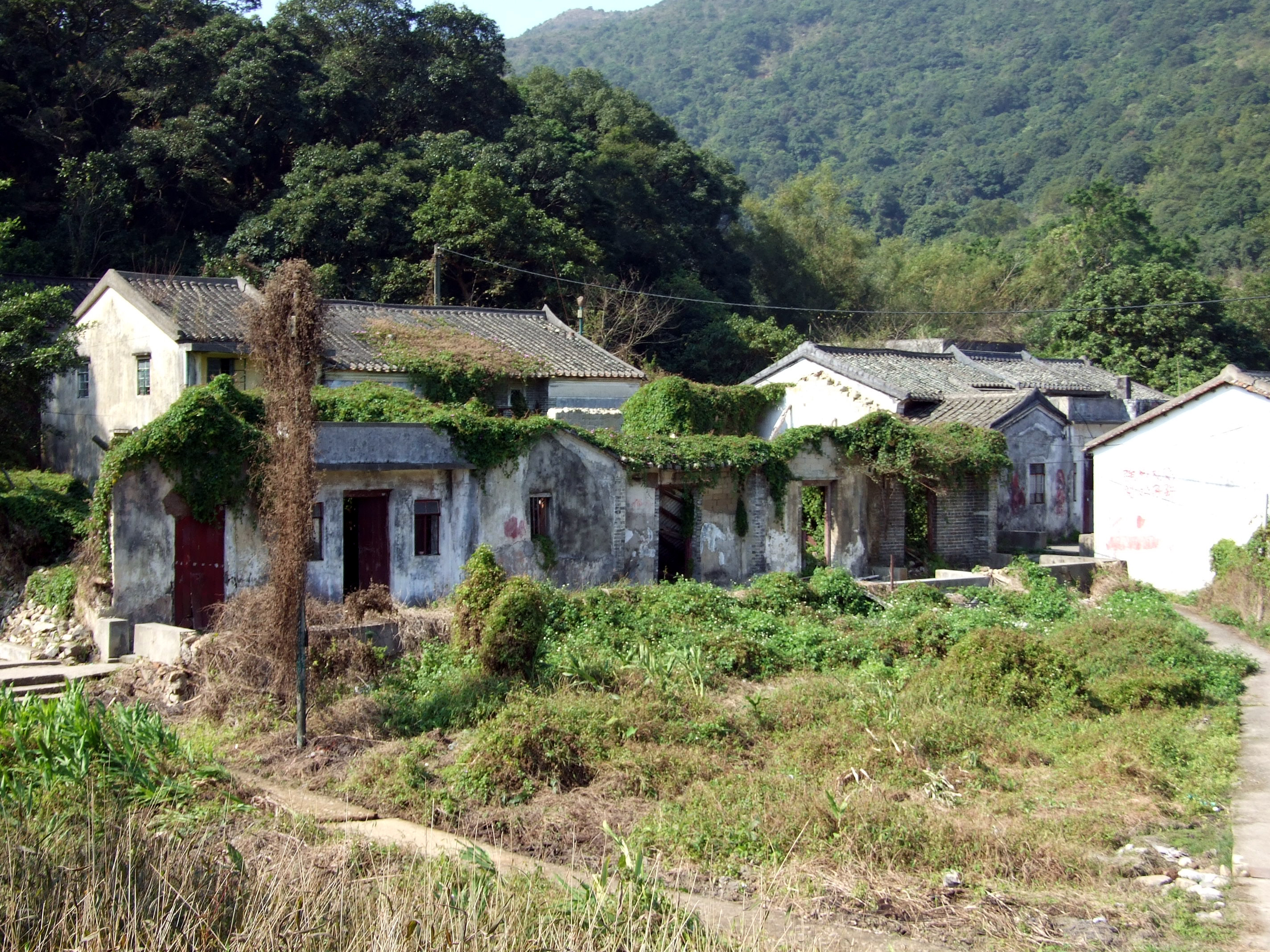 中文（香港）: 沙螺洞張屋